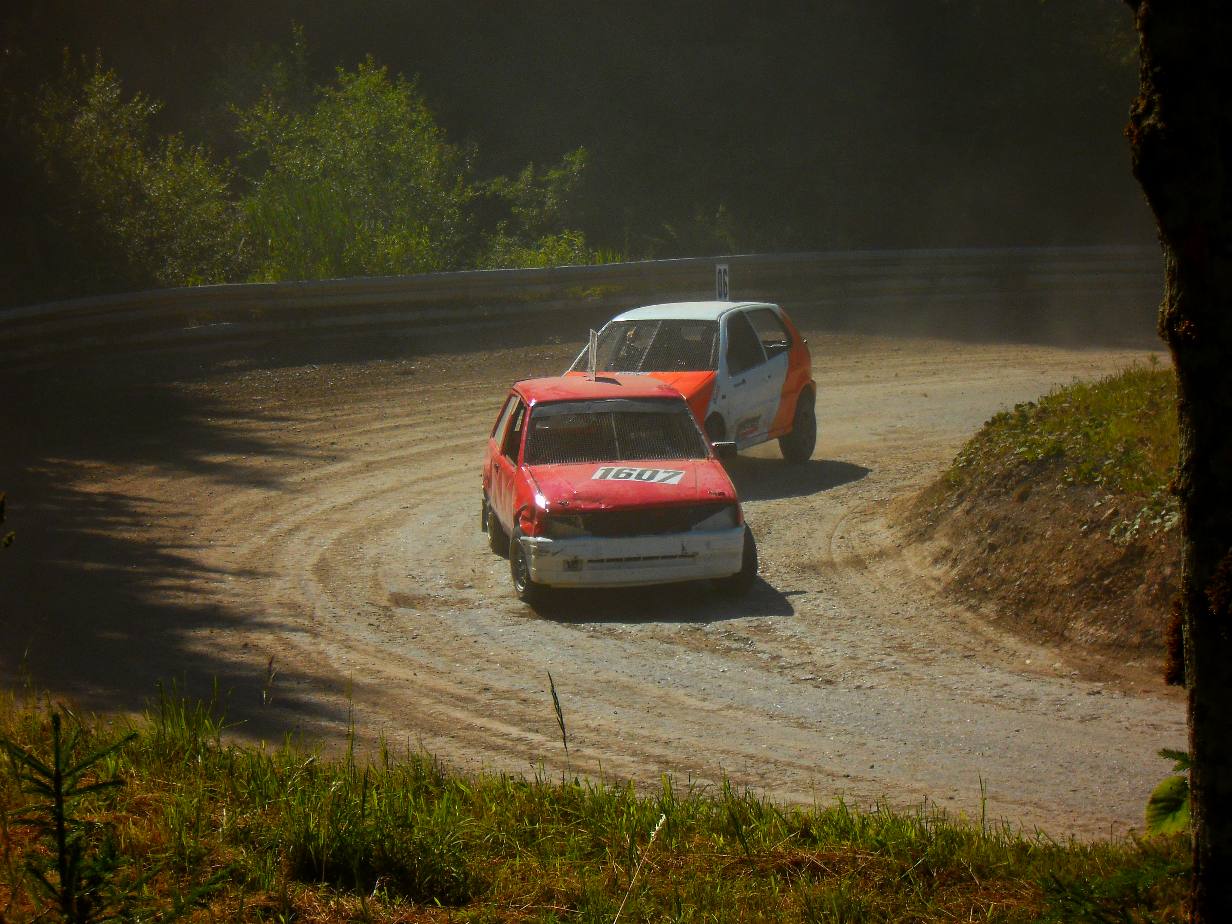 Auto-Cross-Rennen am 26. Juni 2011 auf der Teufelsgurgel-Rennstrecke in Trossingen. Organisiert vom Stock-Car-Club Trossingen ( Die Strecke selbst ist in Trossingen ein "Kulturdenkmal". Dch leider soll sie jetzt (2011) abgerissen werden. Geht auf die Webseite des SCCT und schaut was ihr dagegen unternehmen könnt. Die Strecke ist ein Teil von Trossingen! // Die Strecke wurde abgerissen.